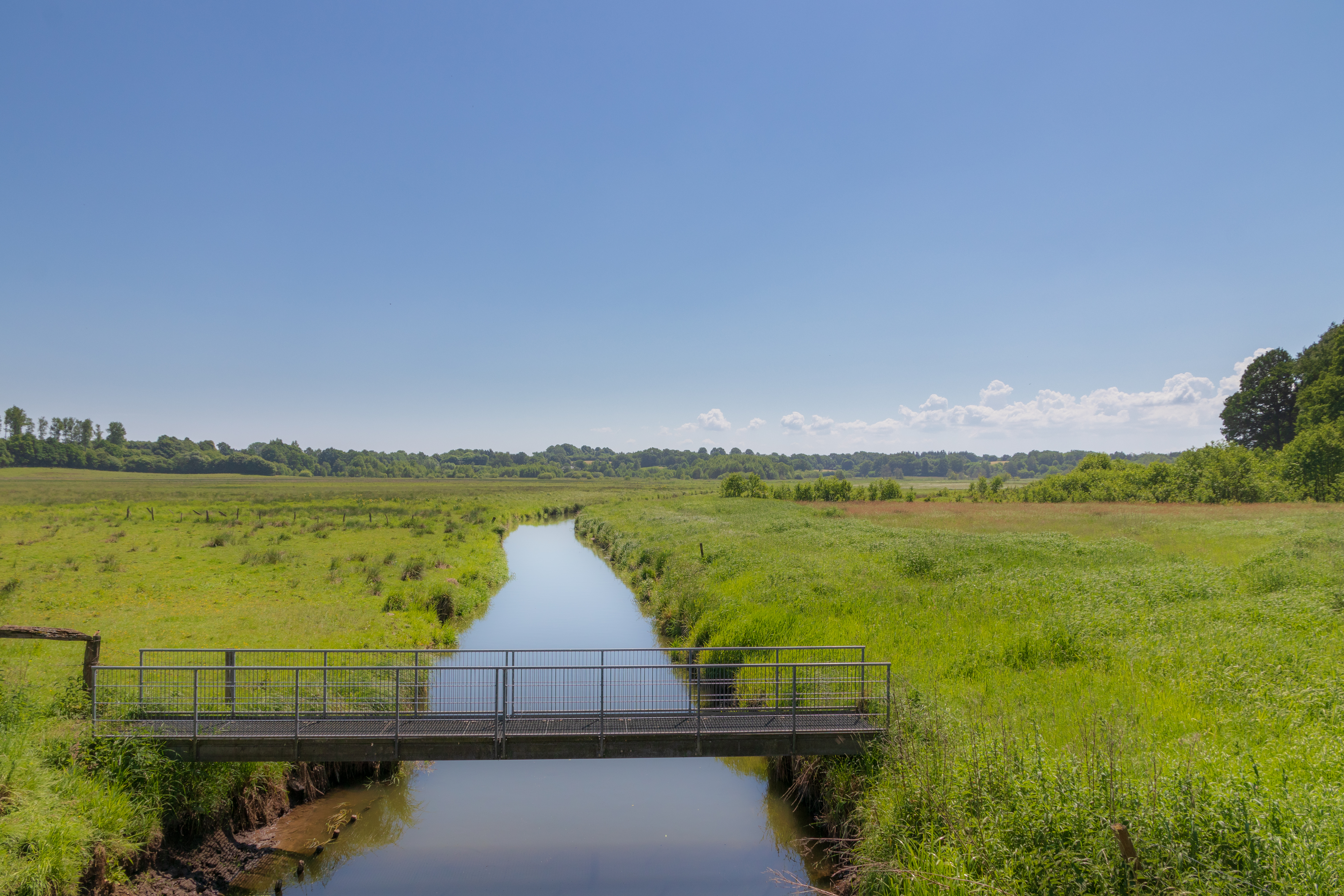 Eiderlandschaft bei Reesdorf